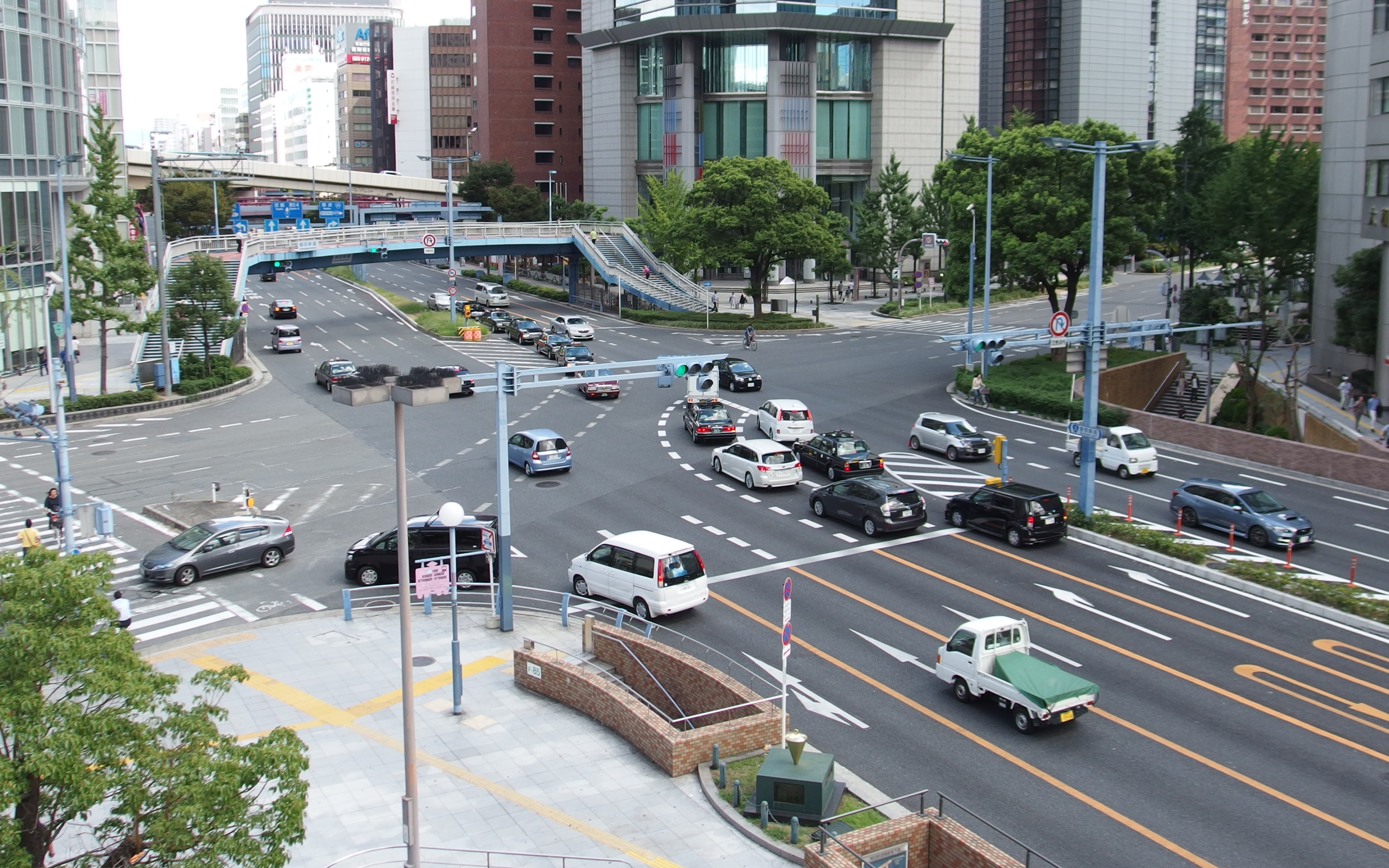 梅田新道交差点, 大阪府大阪市